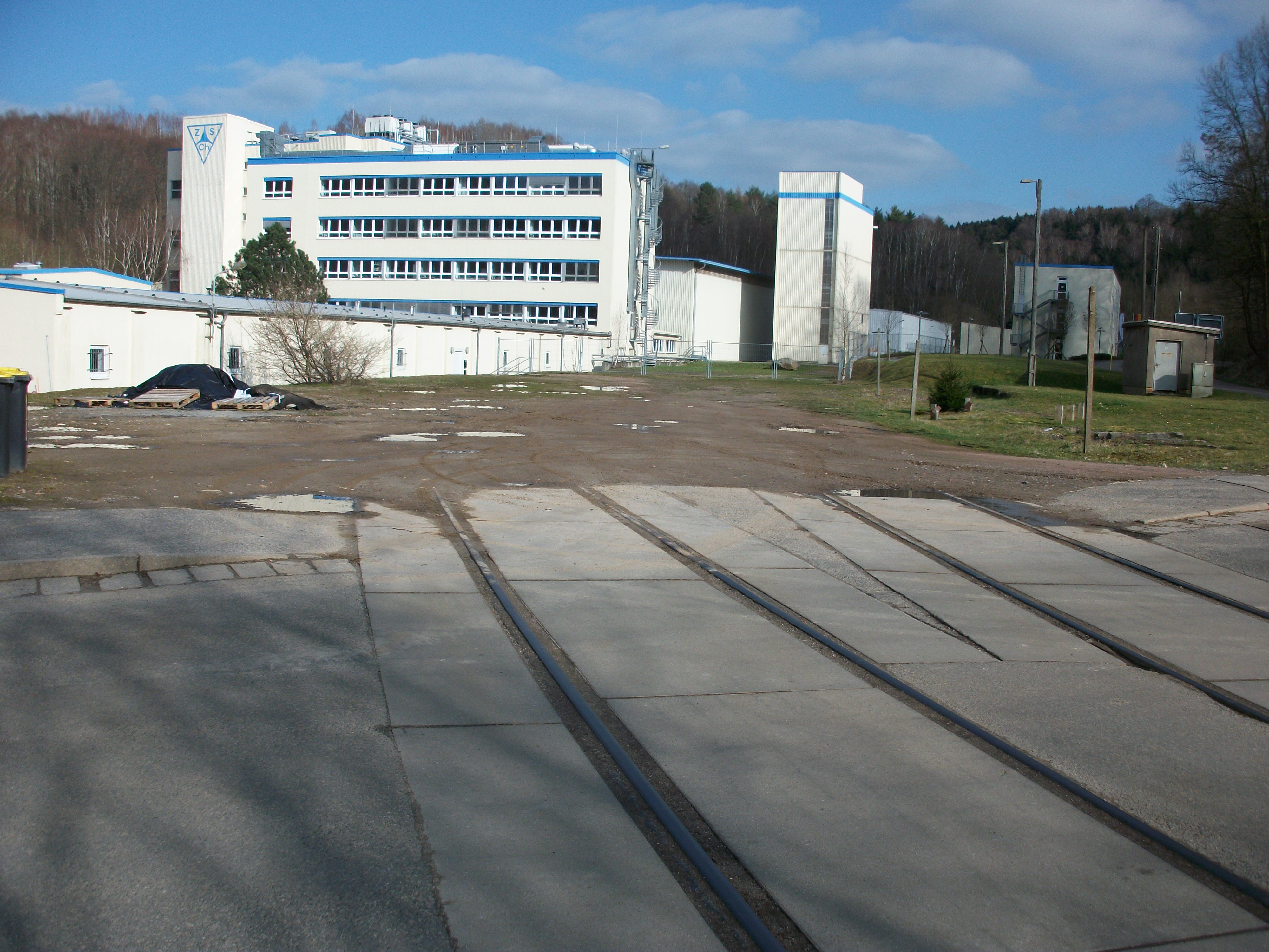 Ehem. Haltestelle Mohsdorf (2016)